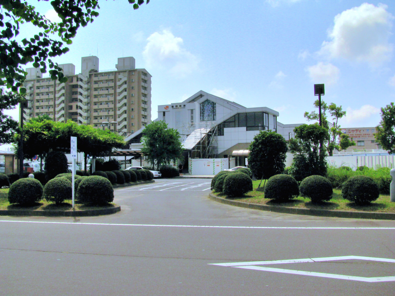 JR東海東海道本線豊田町駅